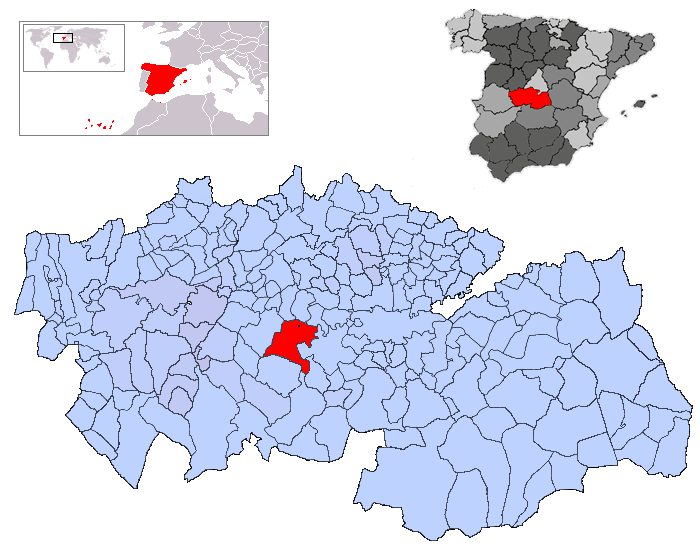 La Puebla de Montalbán en la provincia de Toledo